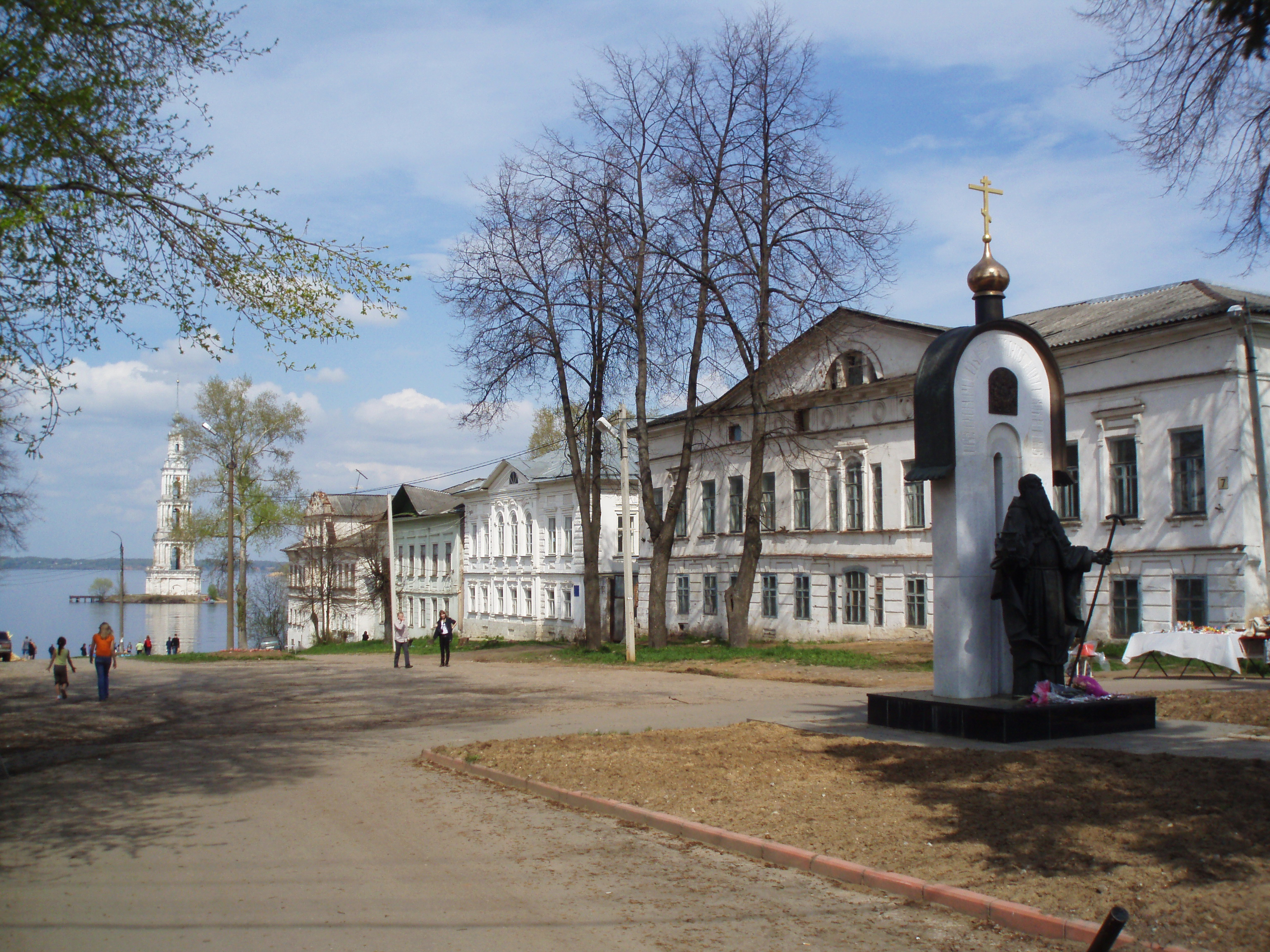 Ансамбль городских зданий (образец жилой застройки) (Тверская область, Калязин, улица Карла Маркса, 1-6, 7/8, 16/18 (12))